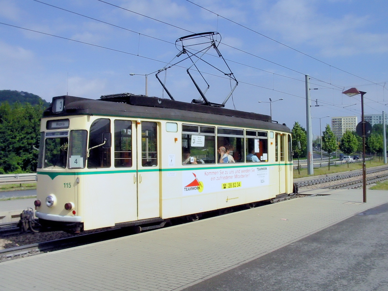 Triebwagen 115 der Jenaer Nahverkehrsgesellschaft am 9. Juli 2003 als GT6M-Ersatzfahrzeug an der Haltestelle Lobeda